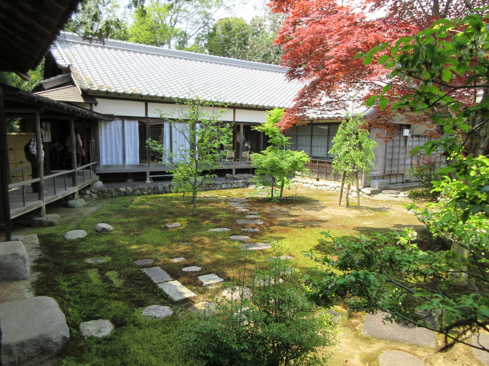 本證寺（安城市野寺町）